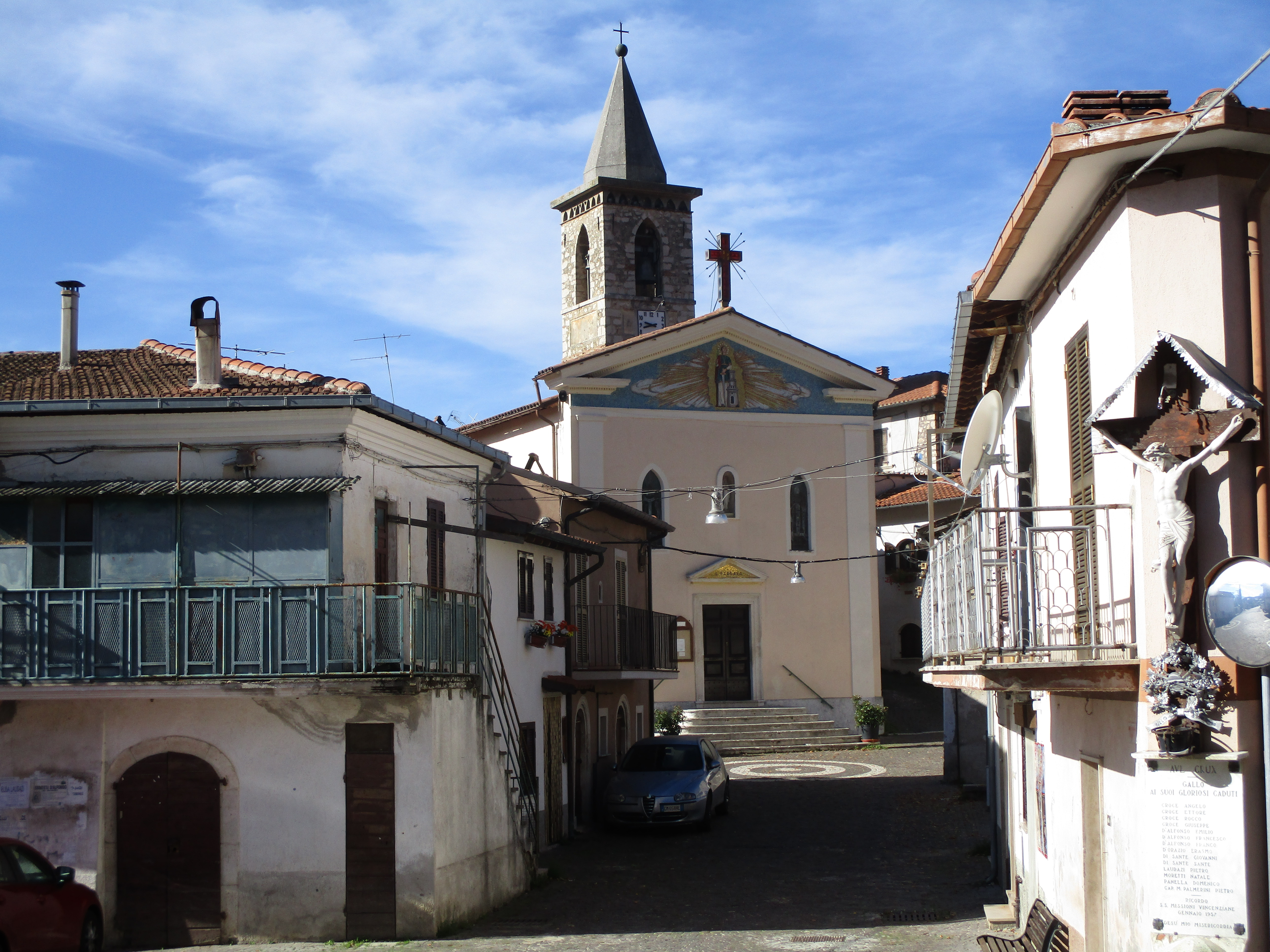 Scorcio fotografico del borgo antico